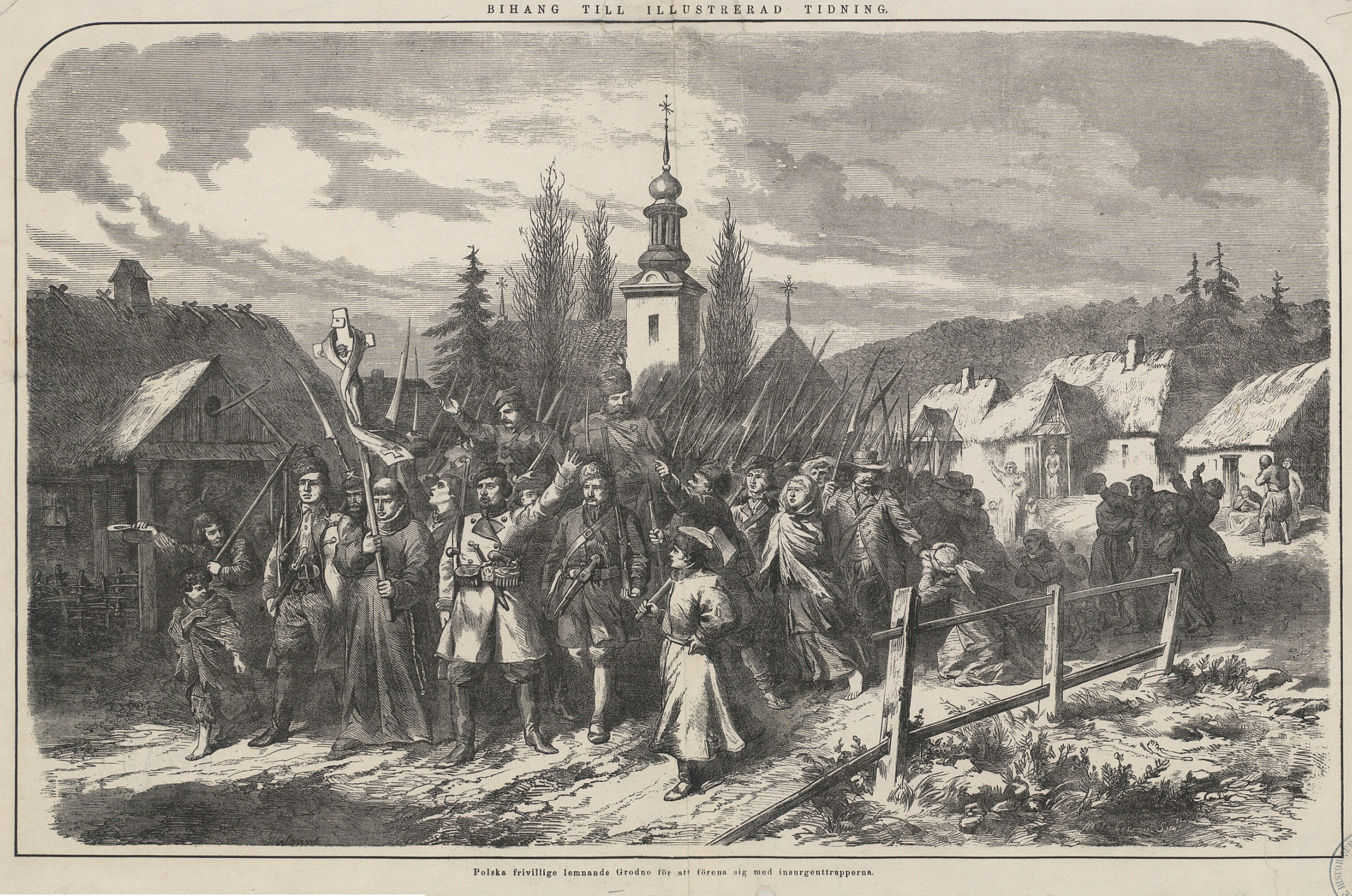 Паўстанцы з ГроднаБеларуская (тарашкевіца): Горадня (Horadnia). Выступленьне ўдзельнікаў нацыянальна-вызвольнага паўстаньня